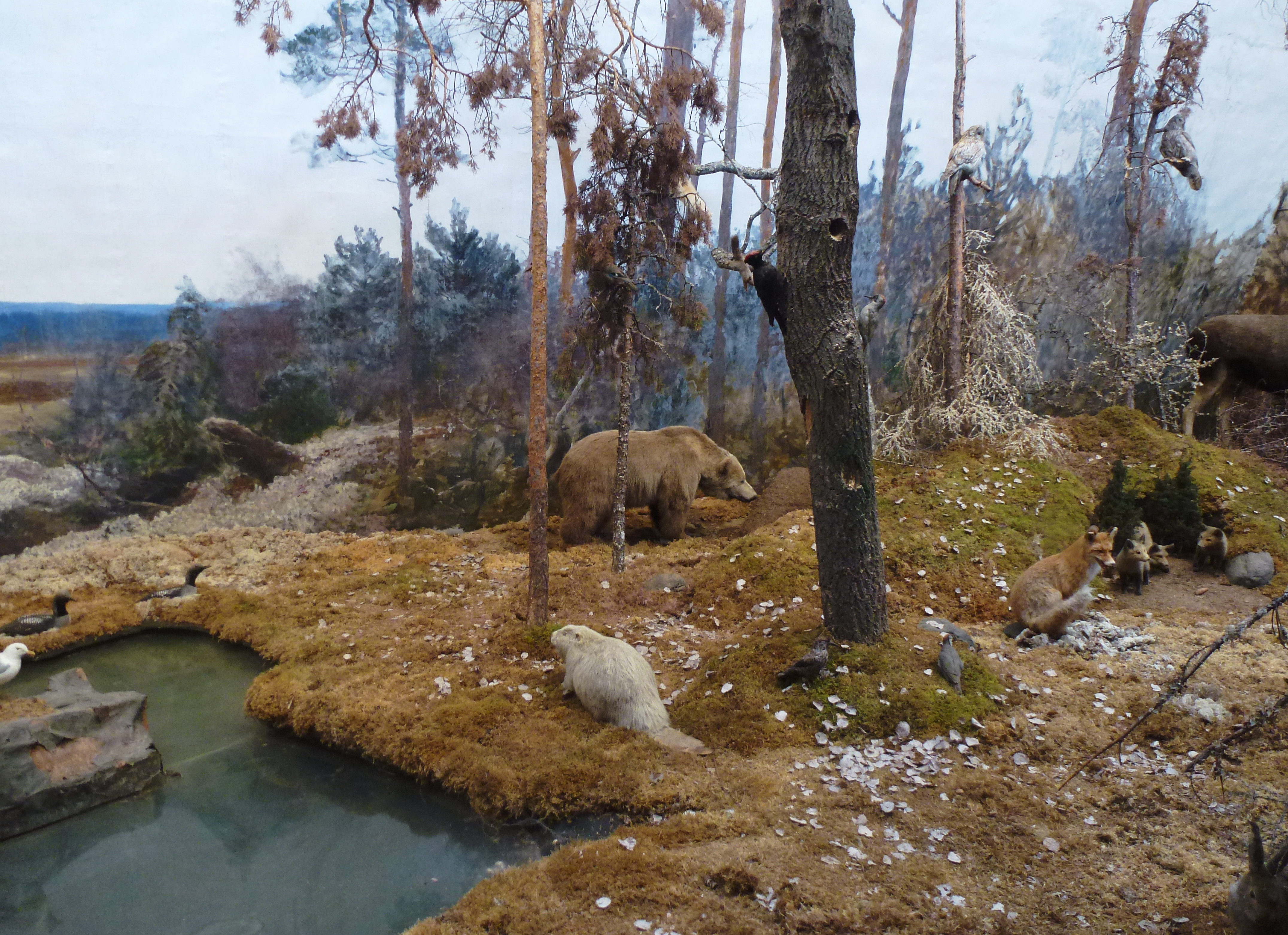 Biologiska museet interiör